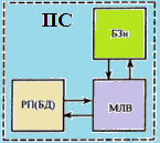 рис1